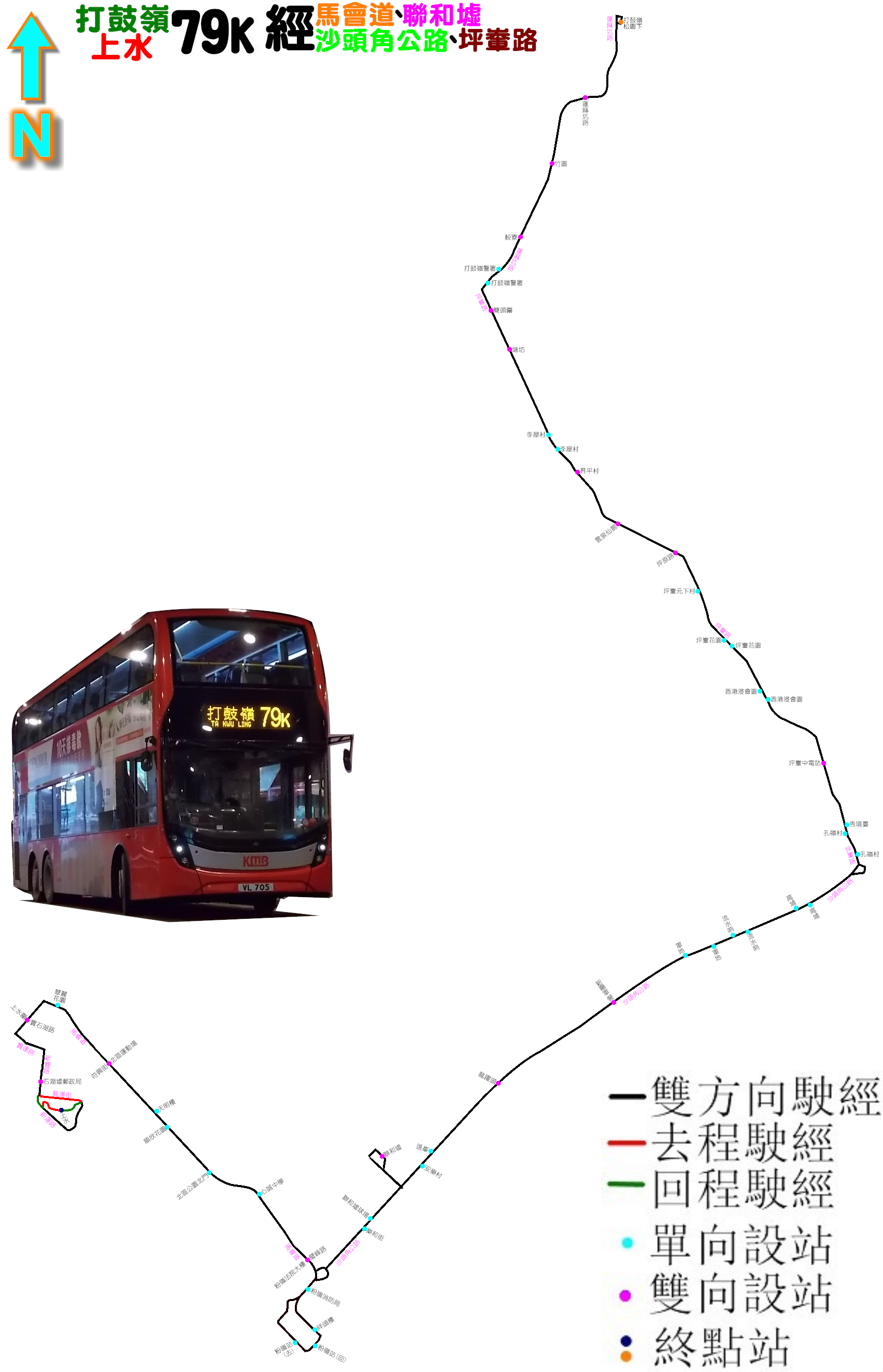 中文（香港）: 九巴79K線的走線圖